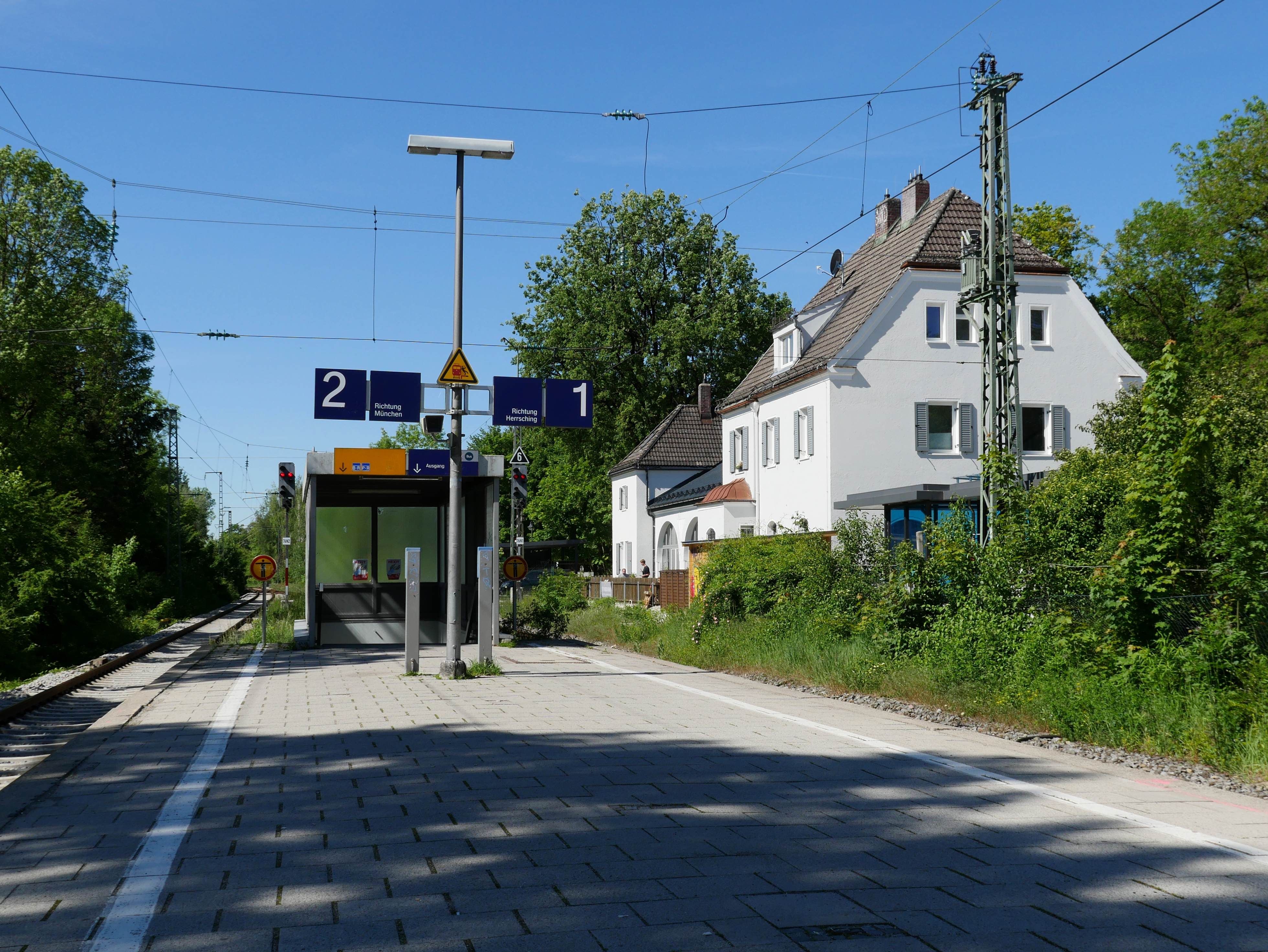 Mittelbahnsteig des Bahnhofs Seefeld-Hechendorf an der Bahnstrecke Pasing–Herrsching, rechts das Empfangsgebäude